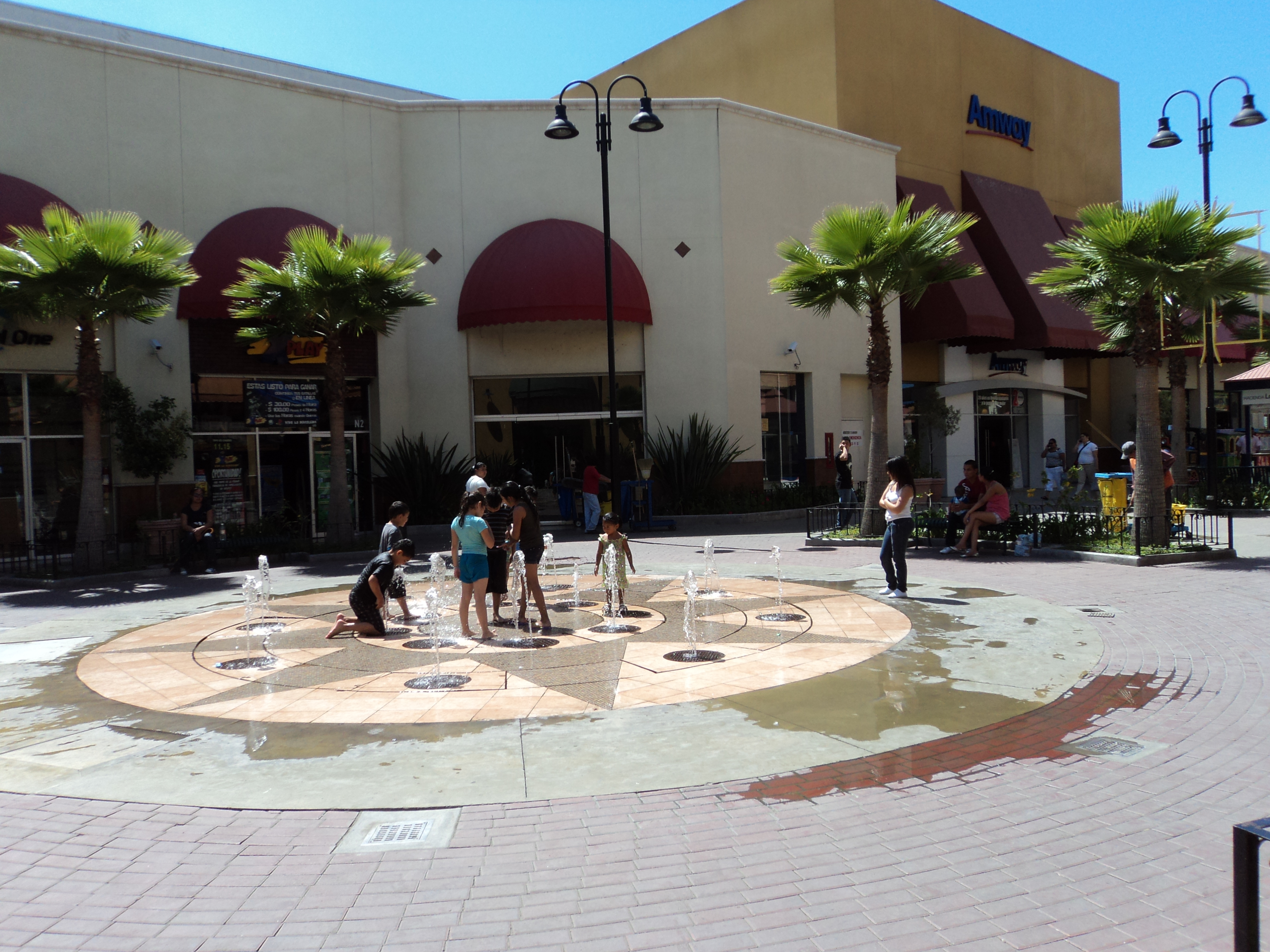 MACRO PLAZA